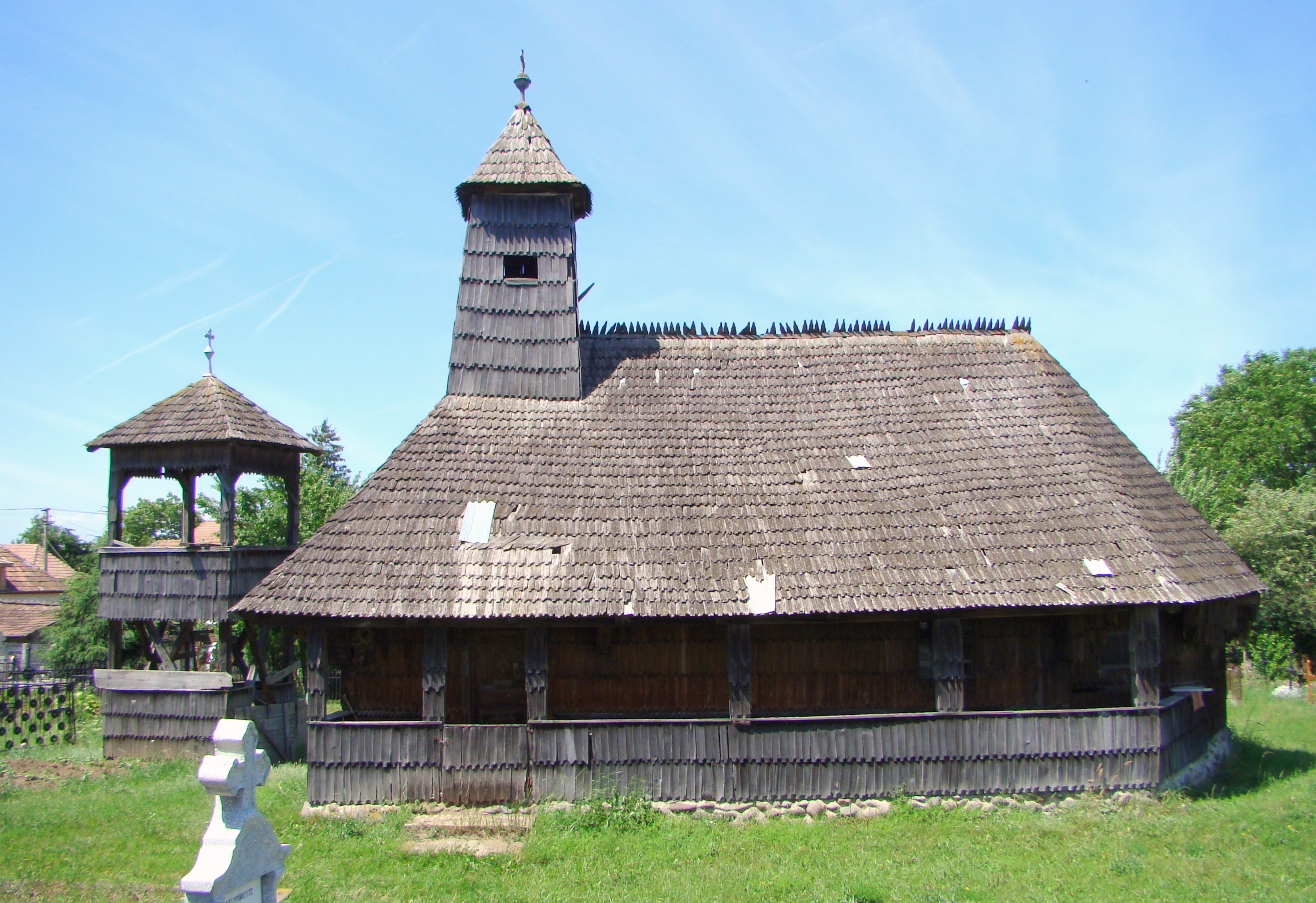 A kutyfalvi fatemplom